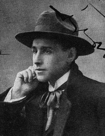 Manuel Ortiz Novo, fotografía en Vida Gallega 1917